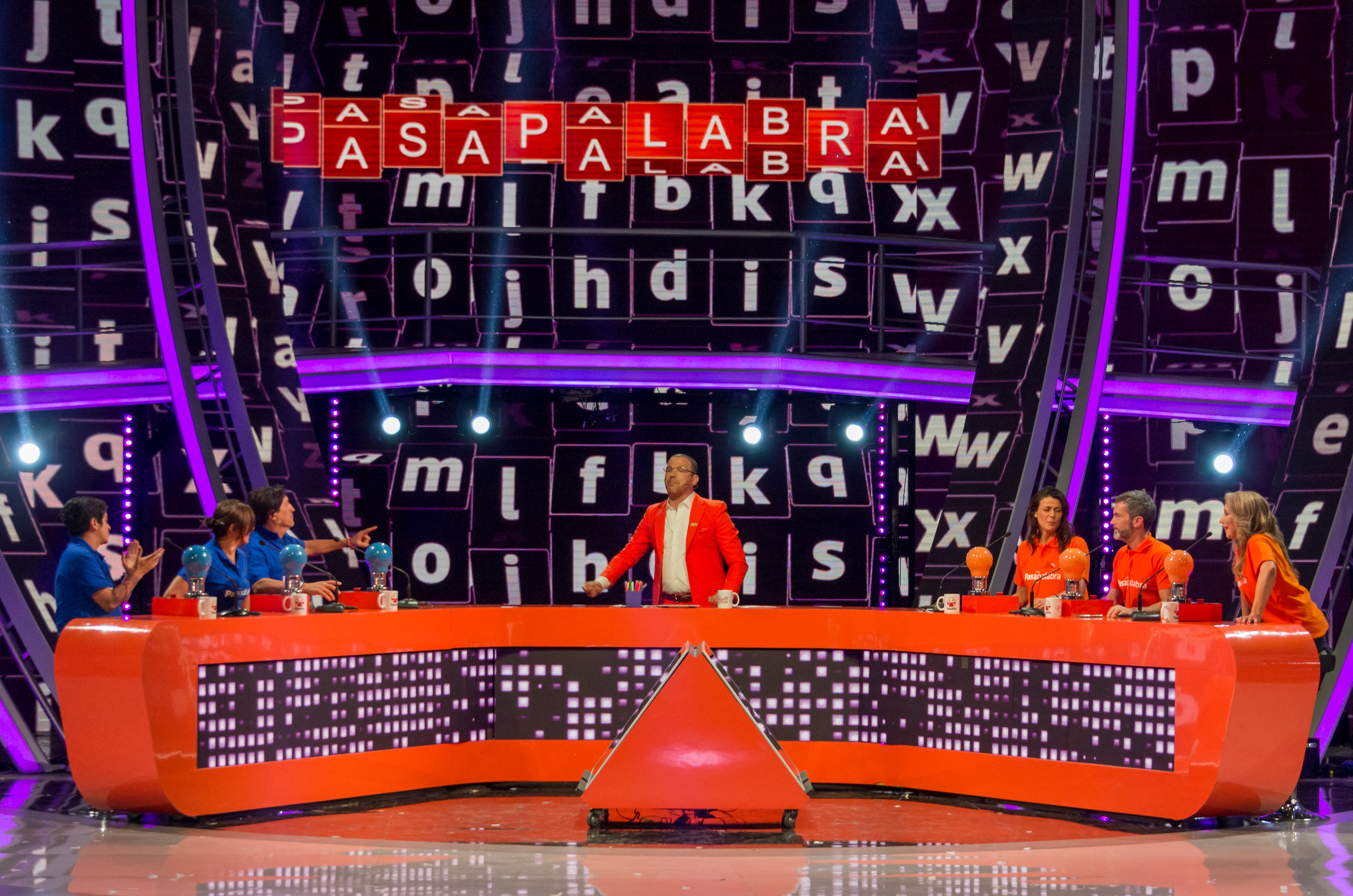 Pasapalabra, Teletón 2018, Teatro Teletón, Santiago, Chile.